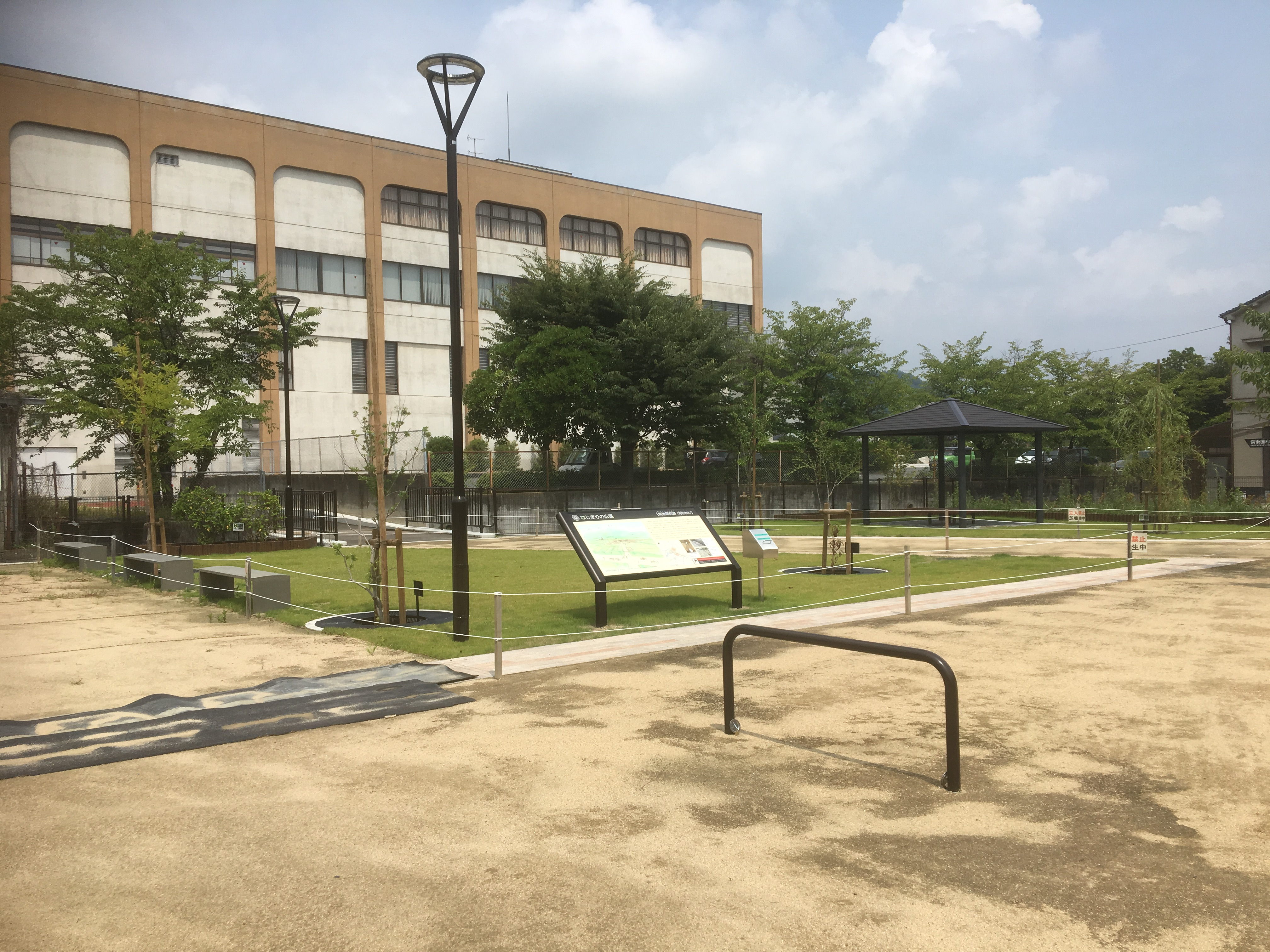 広島県府中市のはじまりの広場